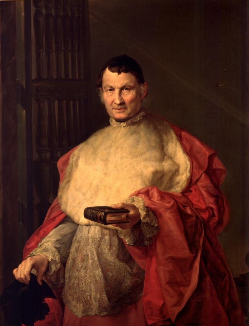 Retrato del canónigo Mariano de Liñán y Morelló (1769-1844), catedrático de Historia y Lengua árabe en la Universidad de Valencia. Fue elegido diputado en las Cortes de 1820 y miembro del Estamento de Próceres en 1834. Fue además Comisario General de la Santa Cruzada y caballero gran cruz de la Orden de Carlos III. Fue elegido obispo de Teruel, cargo que no llegó a ocupar al fallecer en Madrid el día 14 de mayo de 1844. Se hizo famoso en su tierra por legar su fortuna de 55.000 duros para la traída de agua potable a la ciudad de Valencia.